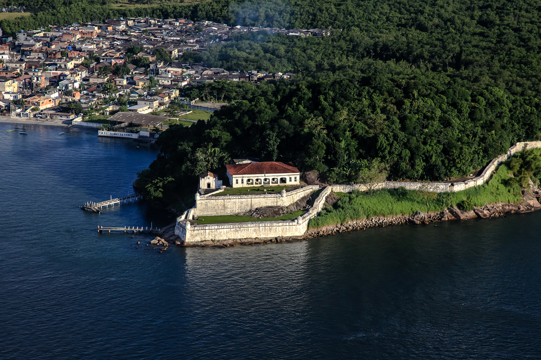 Forte da Barra Grande, inclusive o Fortim da Praia do Góis, o Portão Espanhol e toda a área que os envolve